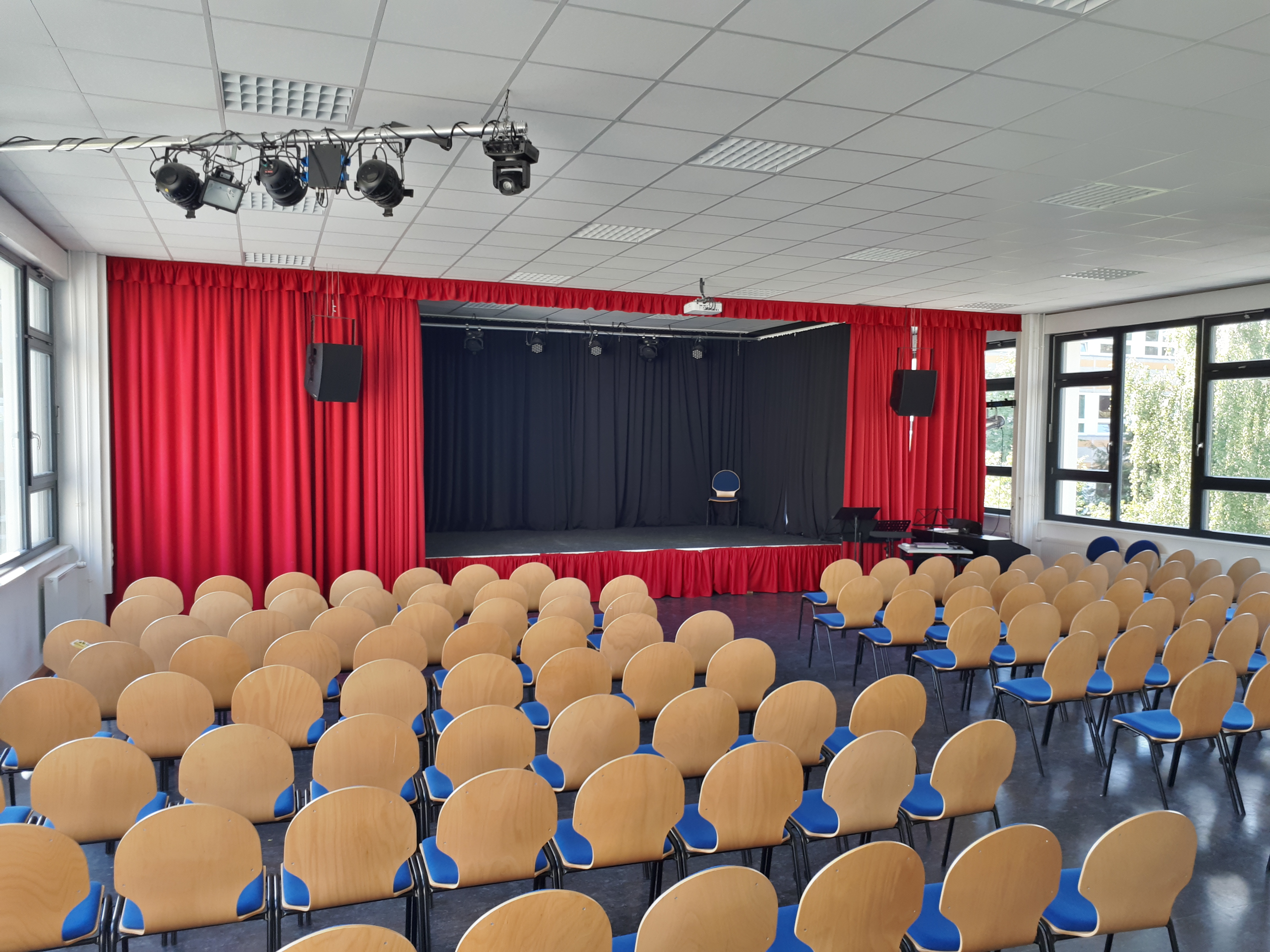 Melanchthon-Gymnasium Berlin, Innenansicht der renovierten Aula